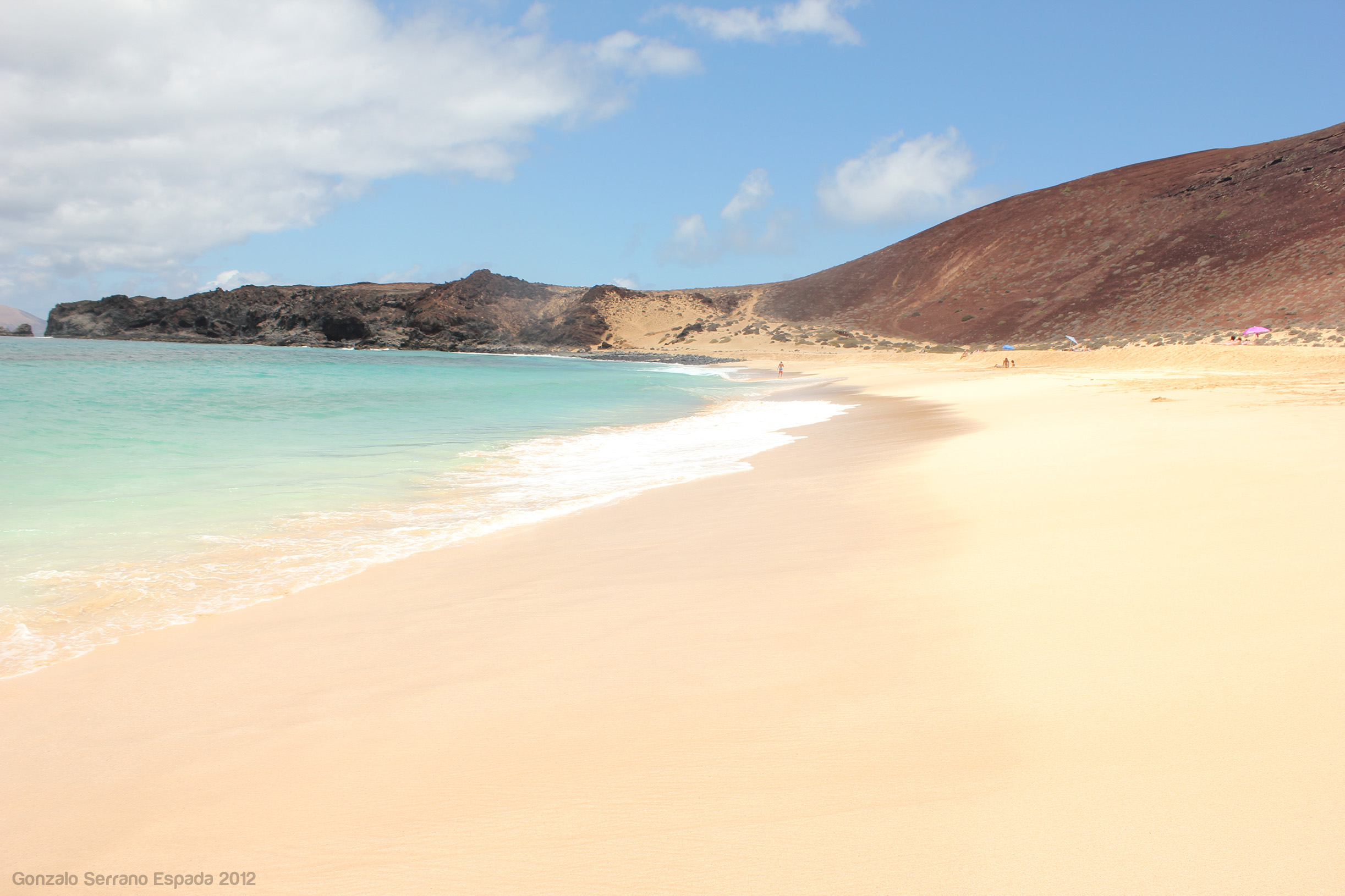 Magnifica playa de las Conchas, situada en la isla de La Graciosa (Islas Canarias)